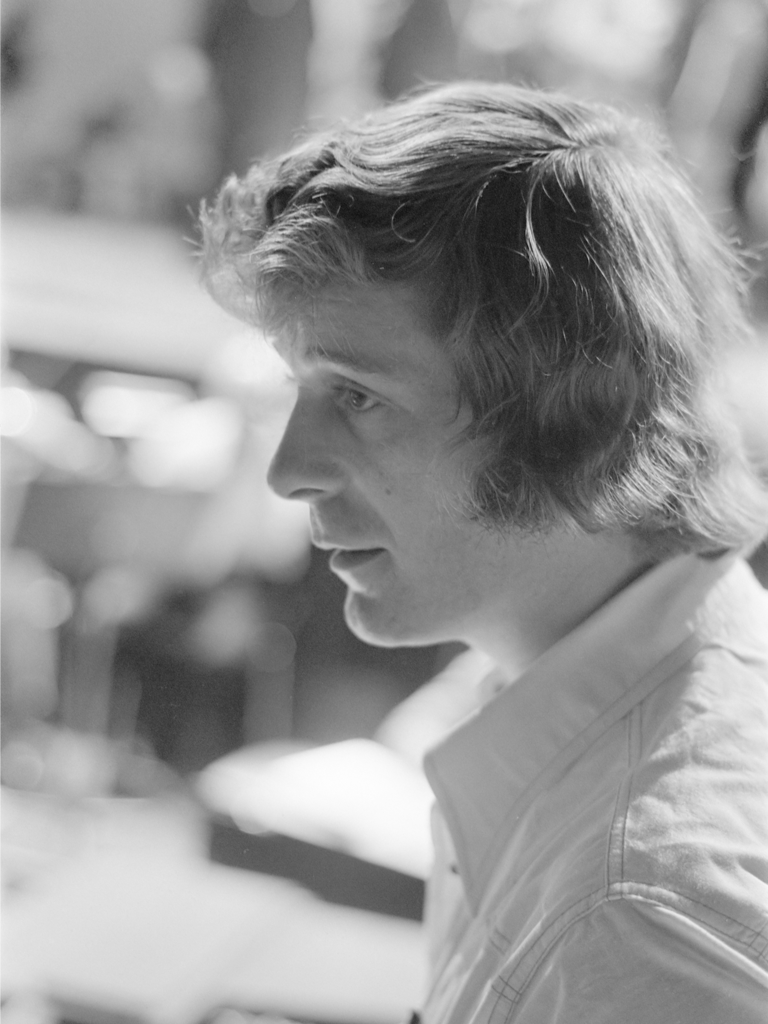 Harry van Hoof tijdens repetities voor het Grand Gala du Disque Populaire 1974